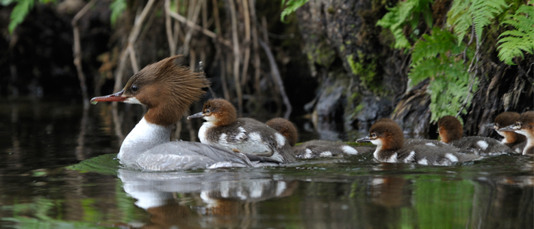 Tracze nurogęsi